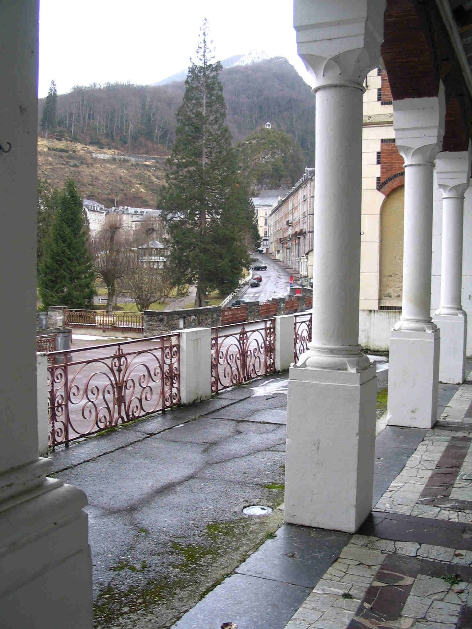 vue du jardin public depuis le casino des Eaux Bonnes